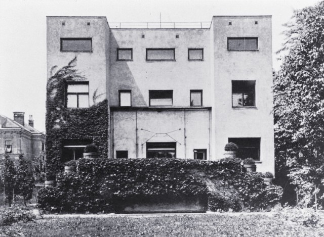 Fachada trasera, demuestra simetria por el exterior de la casa.